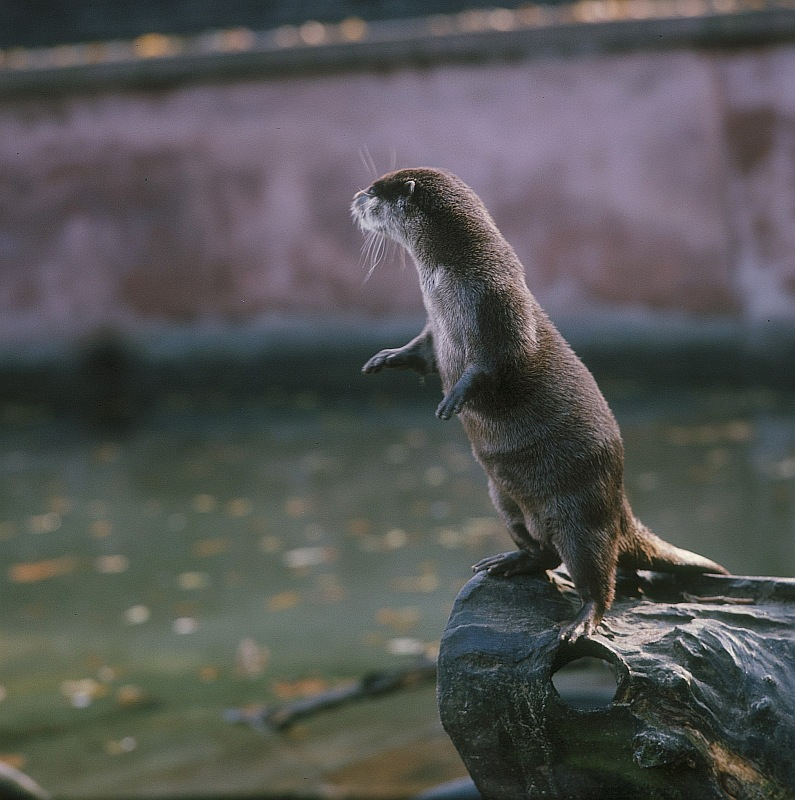 Original image description from the Deutsche Fotothek Fischotter (Lutra lutra)